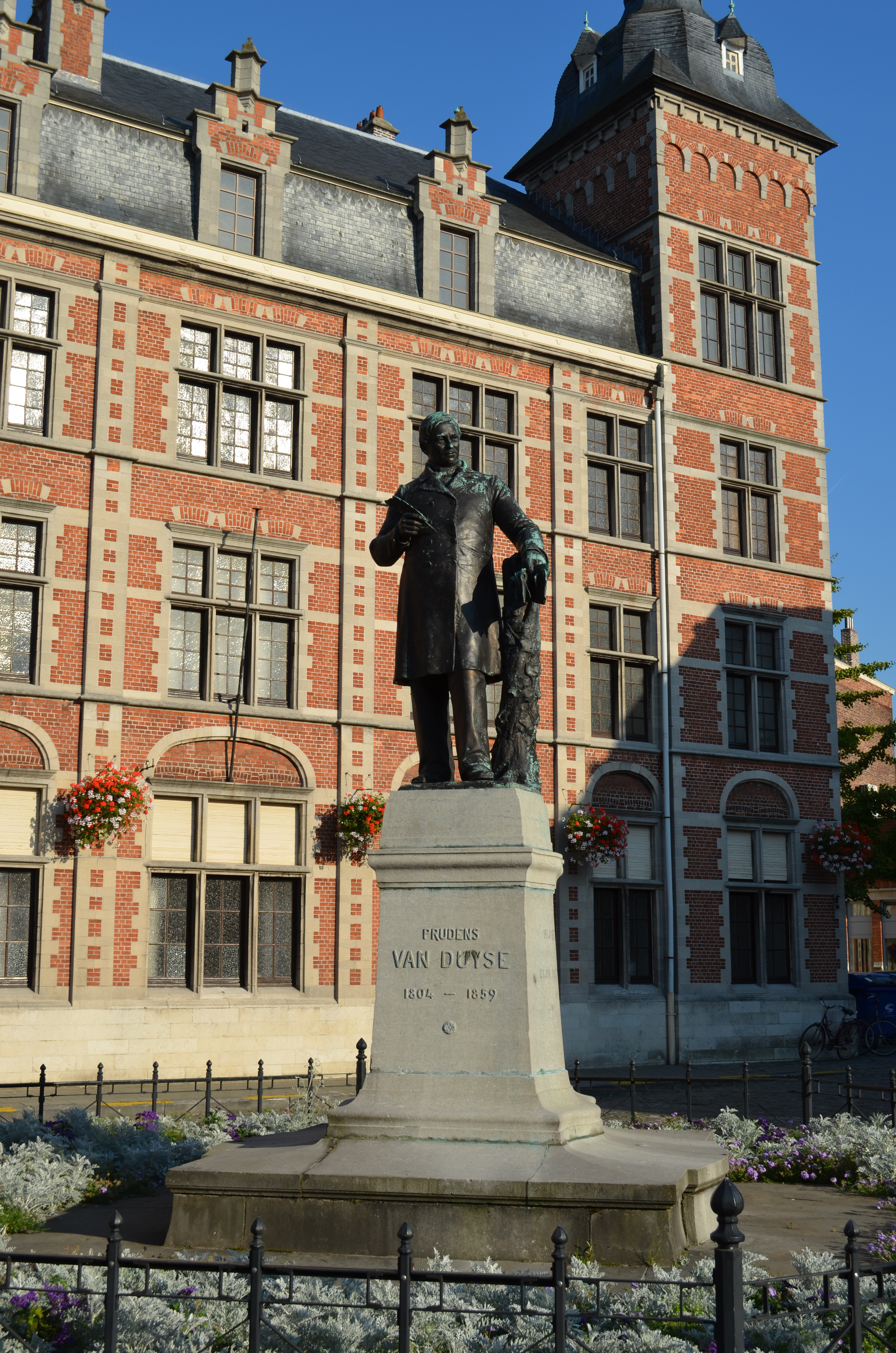 Dendermonde Prudens Van Duyse Dichter en Flamingant